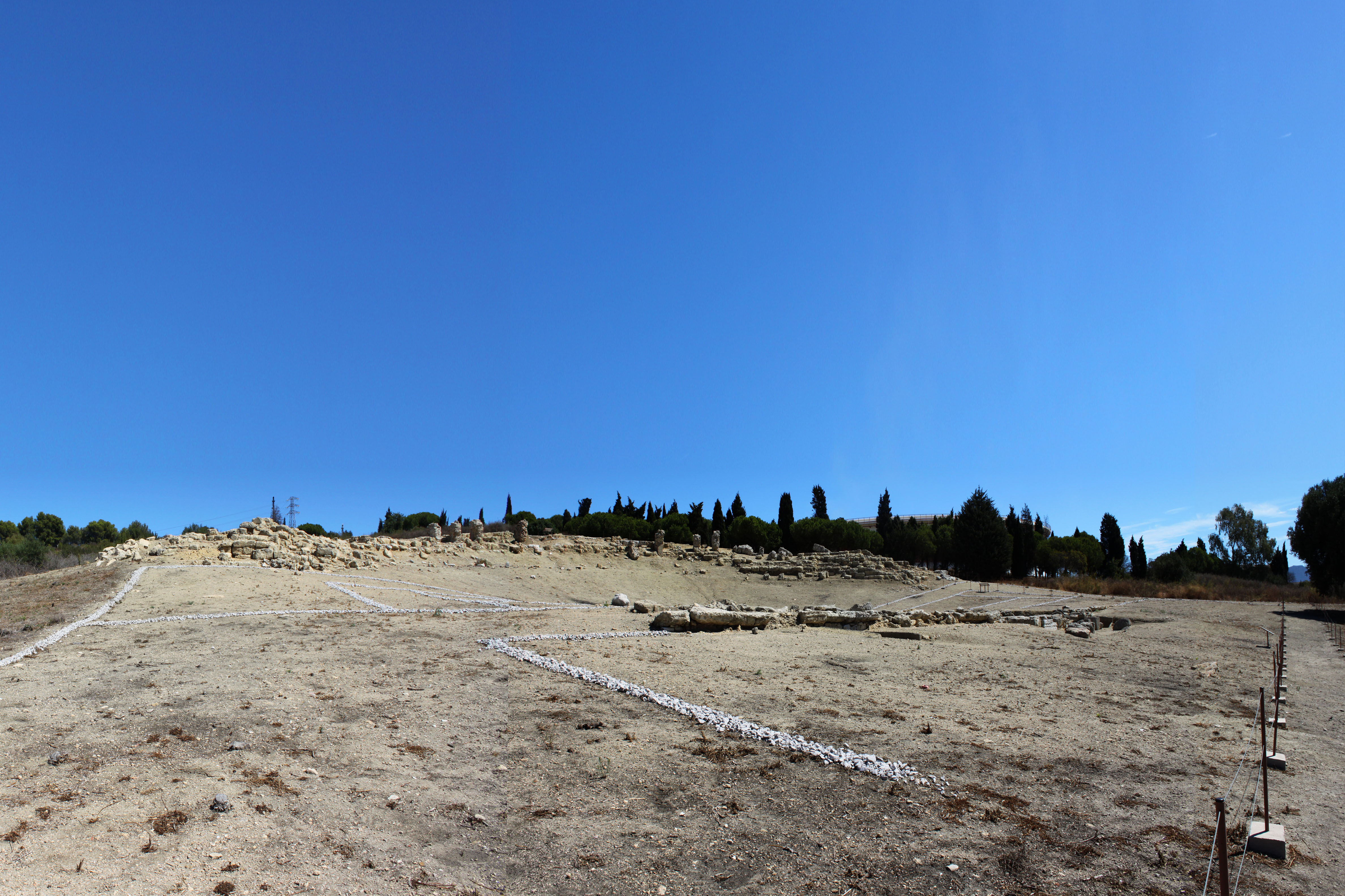 Estructuras visibles del Teatro del yacimiento romano de Carteia. San Roque, Andalucía, España.